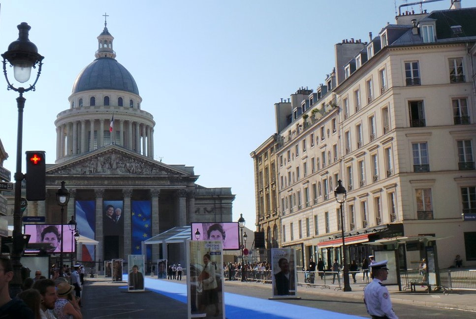 La rue Soufflot et le Panthéon avant le transfert des cendres de Simone et Antoine Veil